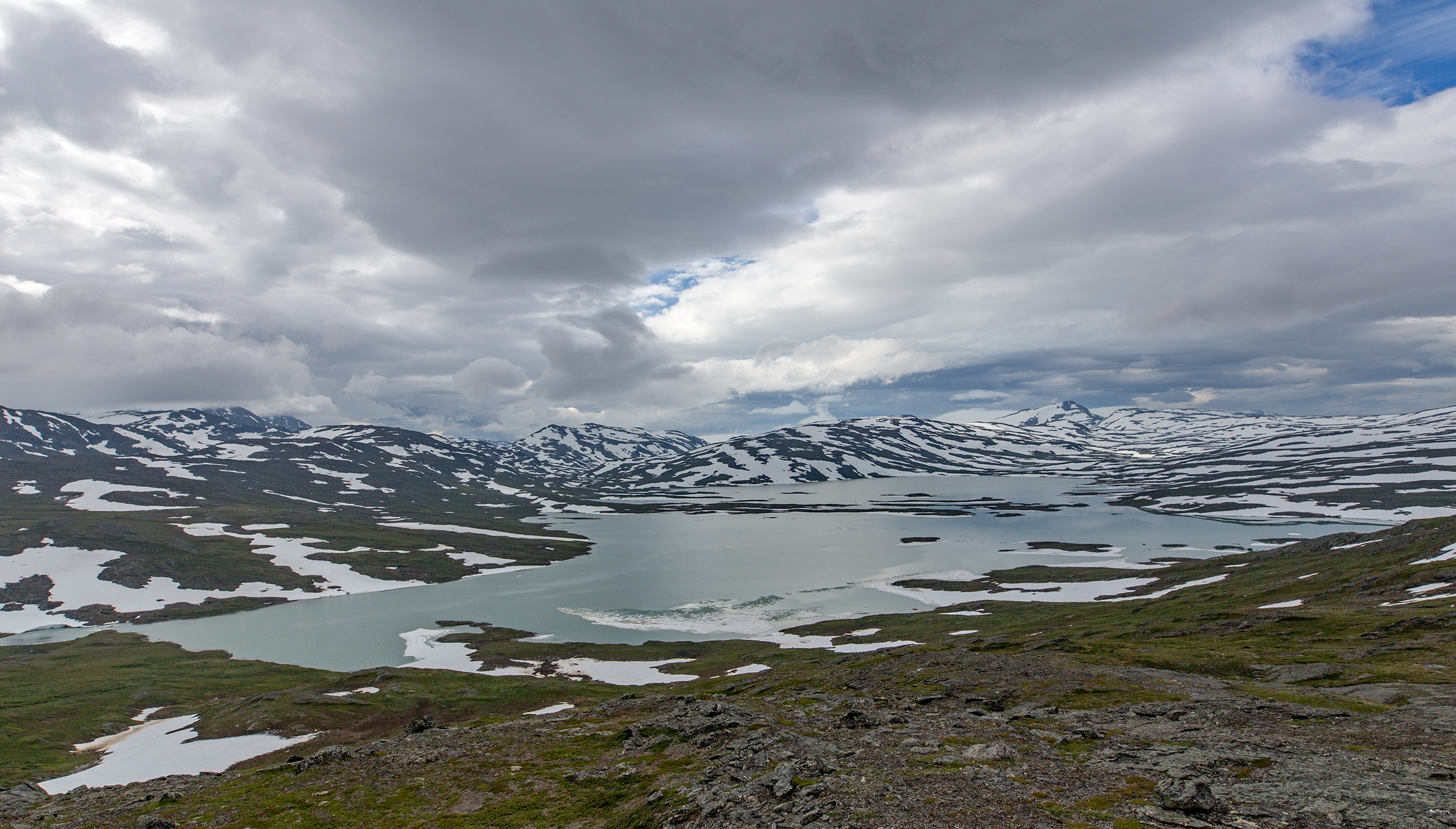 Vy mot Gásakjávrre från östra sidan av Stuorra Duvgge.